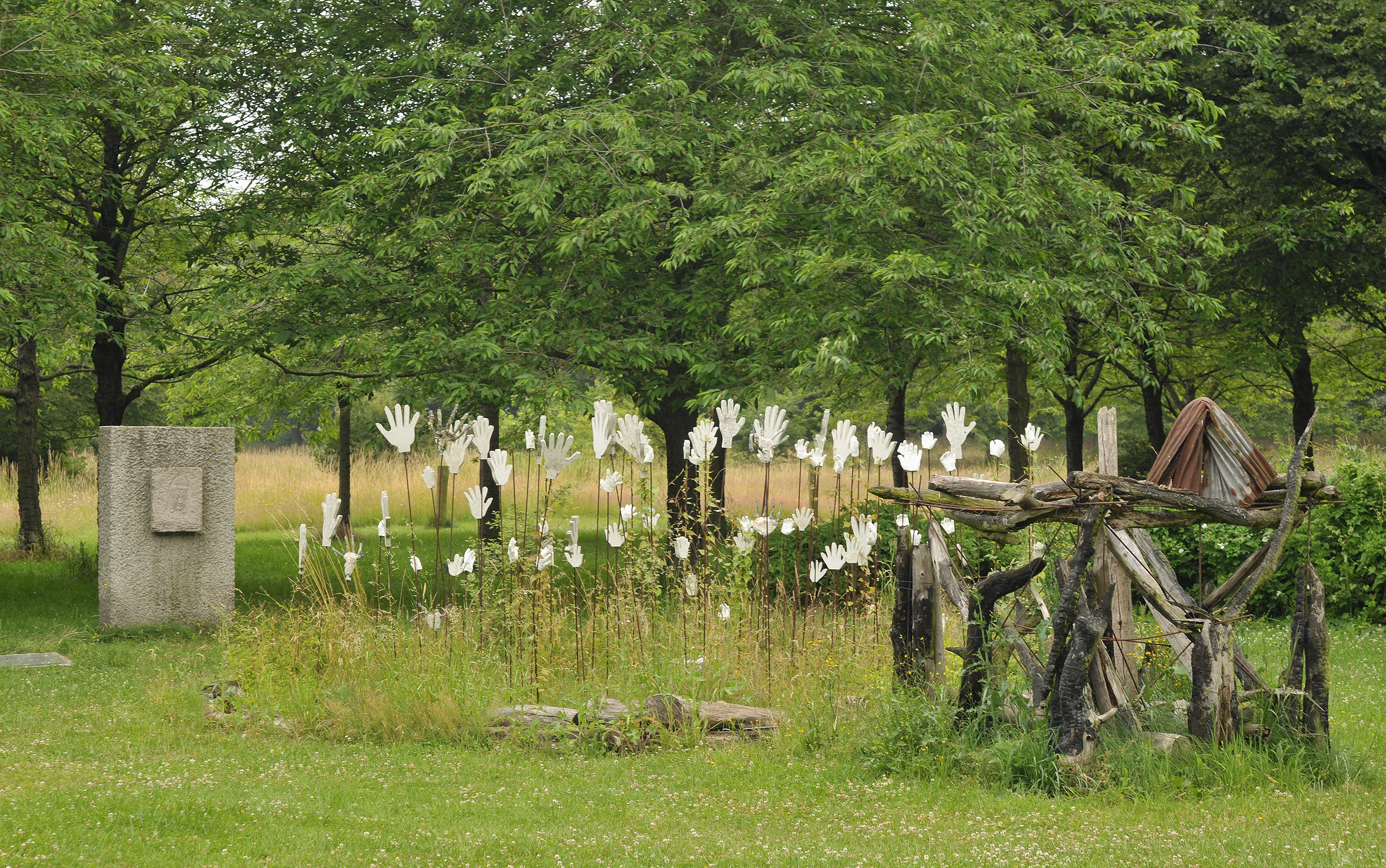 Der Hiroshima-Hain in Hannover wurde 1987 auf dem Gelände der früheren Pferderennbahn Alte Bult an der Eilenriede im Stadtteil Südstadt-Bult angelegt. Die 110 gepflanzten Kirschbäume erinnern an die 110.000 Soforttoten während des Atombombenabwurfs über Hiroshima am 6. August 1945. Auf dem heutigen Landschaftsschutzgebiet wurde 1992 ein Gedenkstein aus einer Steinplatte aufgestellt, die am 6. August 1945 zum Straßenbahnnetz von Hiroshima gehörte. Darauf wurde ein Relief der Friedensgöttin Kannon aufgebracht. Das aus Baumstämmen ausgelegte CND-Symbol zeigt das Zeichen für die atomare Abrüstung. Dort erinnern rings um das Modell des Genbaku Domes herum die weißen Hände, die sich zum Himmel ausstrecken, an das Leid der betroffenen Menschen. Klaus-Dieter Kappenberg gestaltete diese Installation im Jahr 2000.